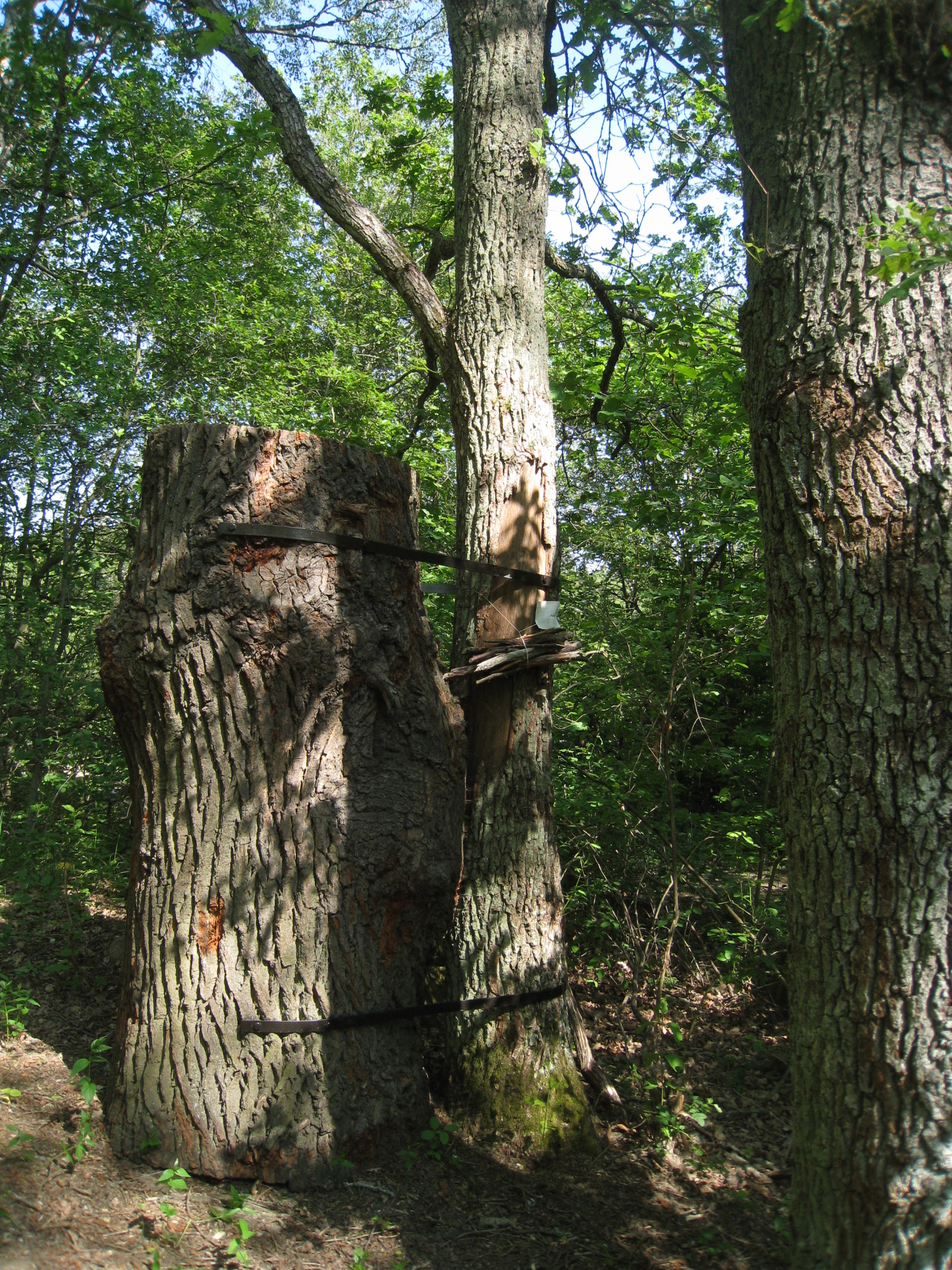 Judarskogens naturreservat, mulmholkar för insekter. Onsdagen 21 mars 2018 fällde Stockholms stads entreprenör Jacksons Trädvård AB ekar vid Nyängsvägen i Bromma. Ekarna togs ner för att ge plats åt nya bostäder inom projektet Västerled och de blev mulmholkar för insekter. Ekarna gjordes om till mulmholkar, en slags holk som efterliknar den rätta ekmiljön där mulmekar saknas. Mulmholkar är gjorda åt insekter som både bor, lever och äter i holkarna. Mulmholkarna placerades ut i Judarskogens naturreservat under våren 2018.